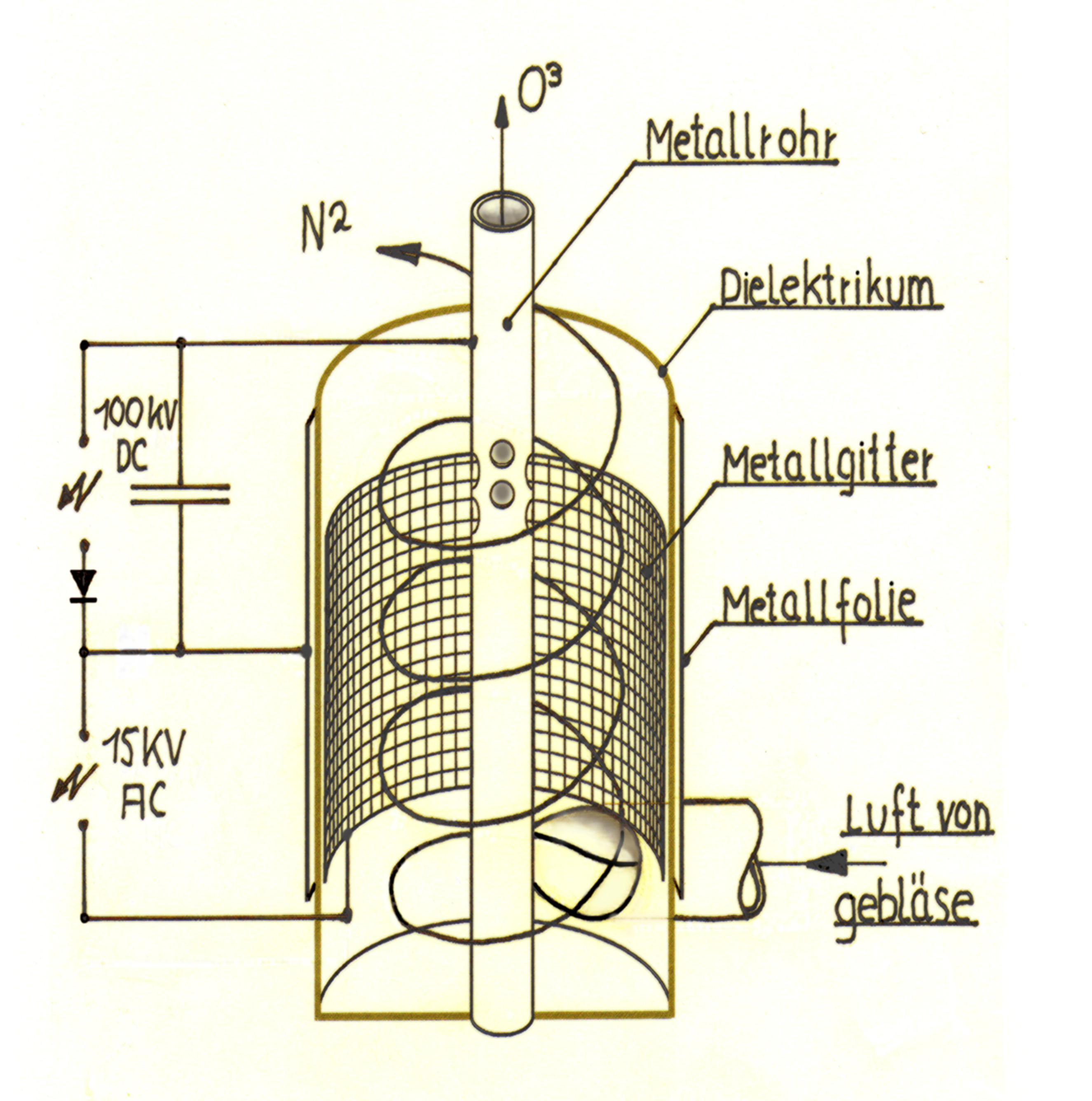 Ozongenerator